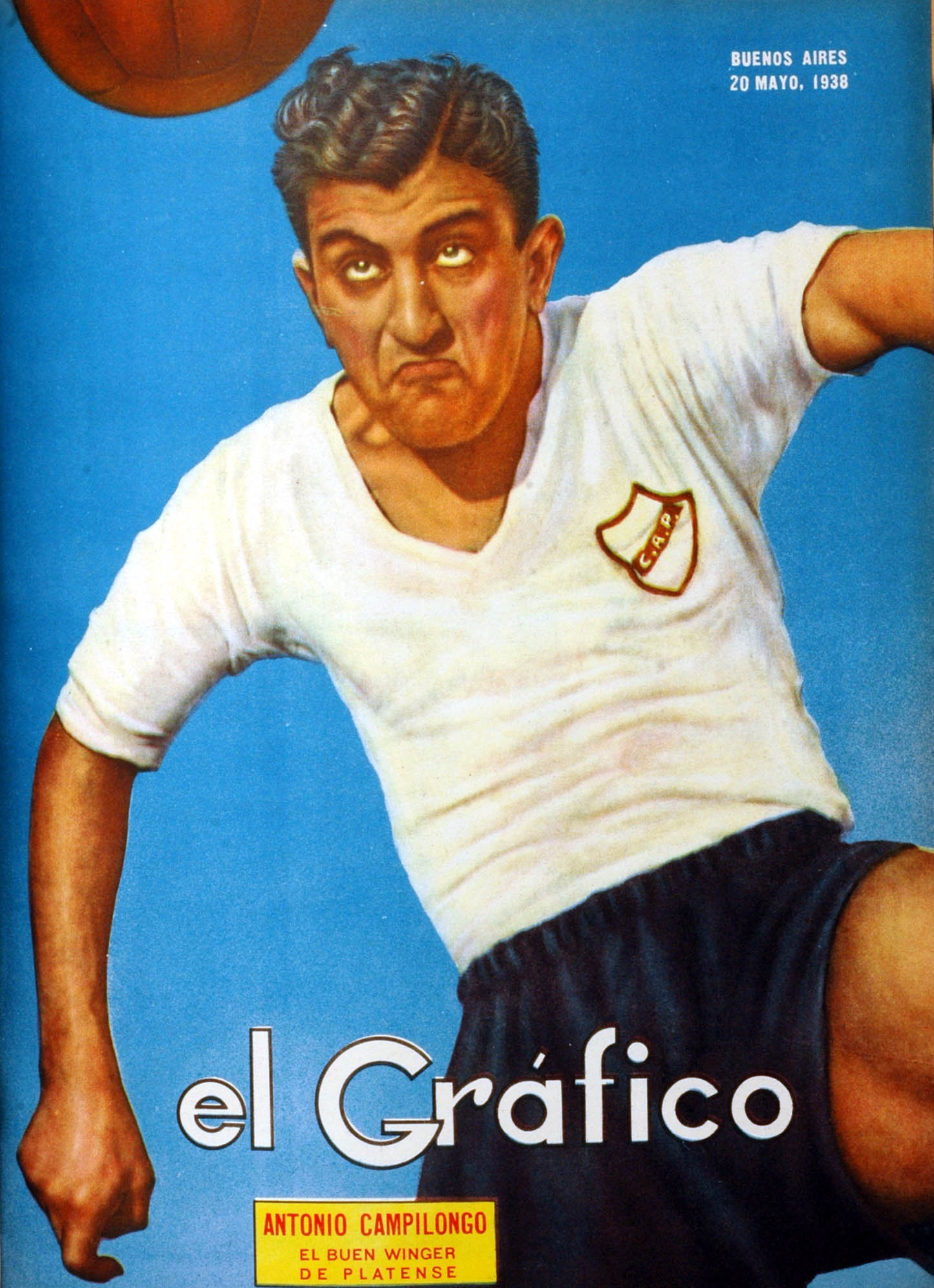 El Grafico del 20 de Mayo de 1938. Edicion 984